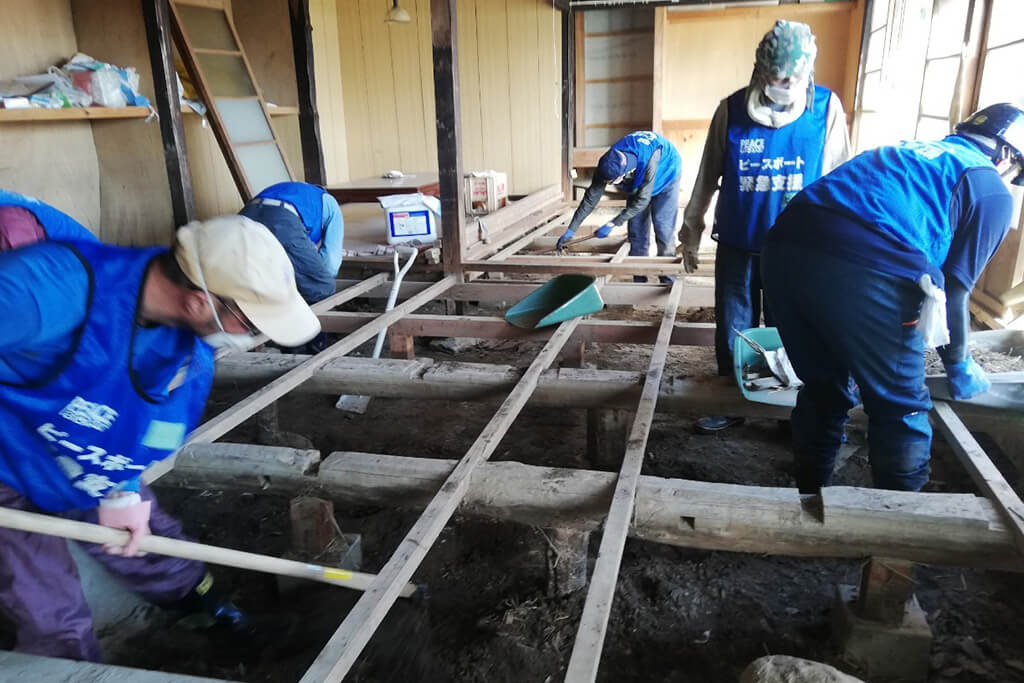 2019年に福島県と千葉県で被害があった台風15号、19号。